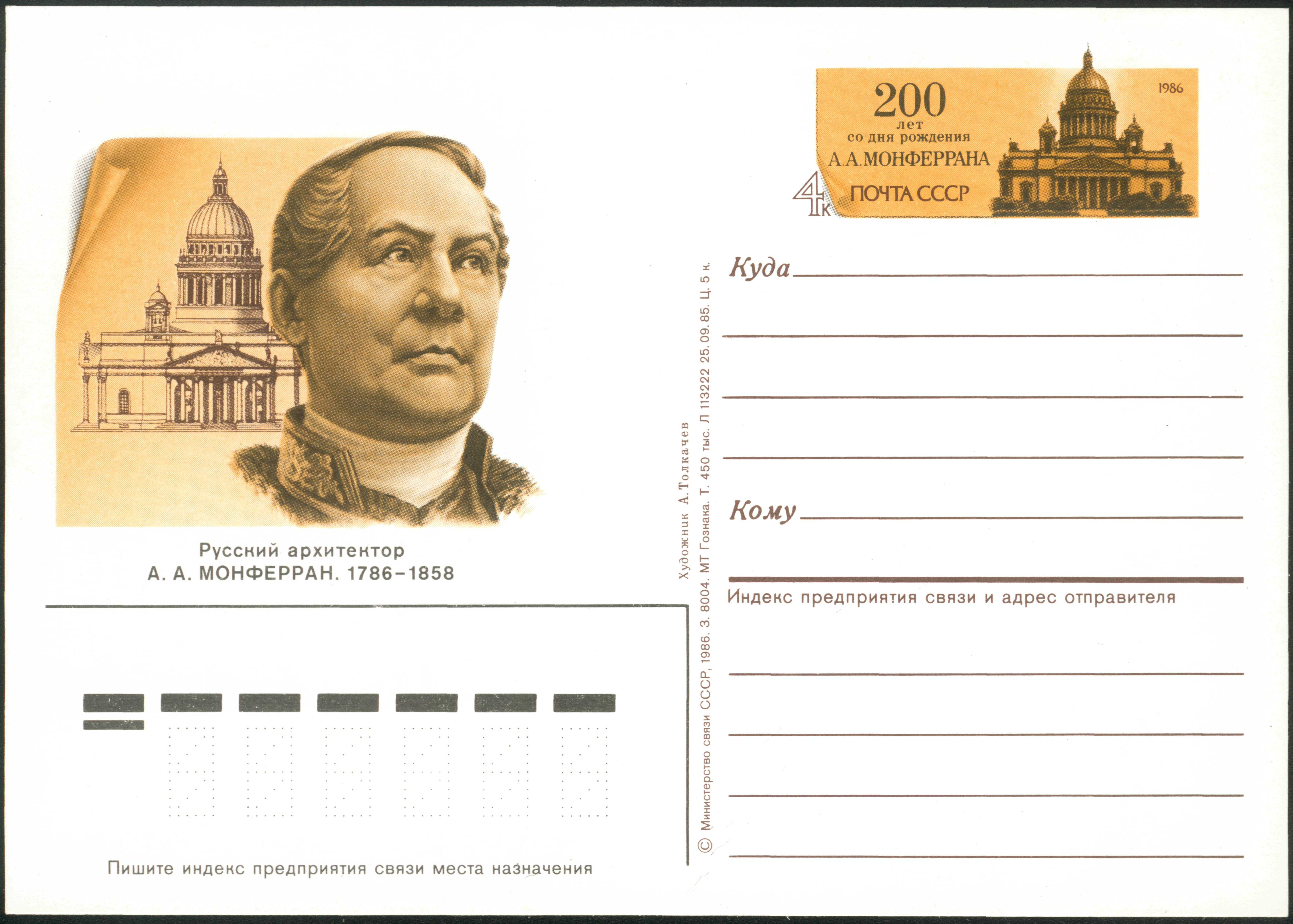 Monferran. USSR original stamp, 1986 Русский архитектор Монферран. 200 лет со дня рождения . Односторонняя почтовая карточка СССР с оригинальной маркой. 1986 год. Дата подписания в печать - 25 сентября 1985. Тираж 450 тысяч.